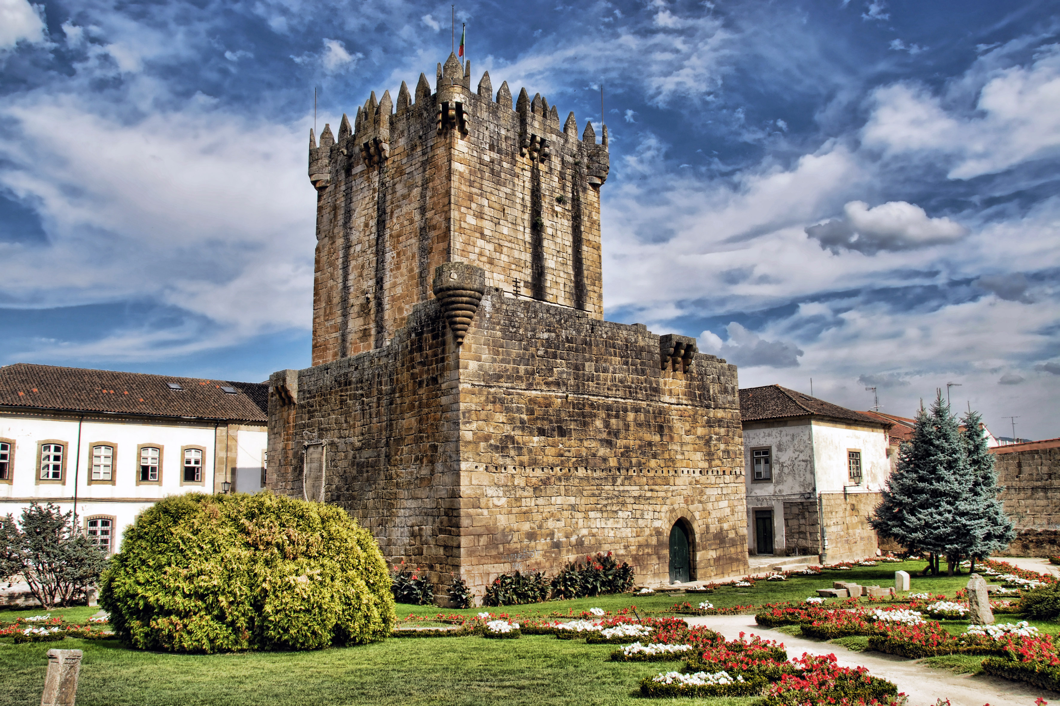 Castelo ou Forte de Chaves This file was uploaded for Wiki Loves Monuments in Portugal with the unique identifier 70655.